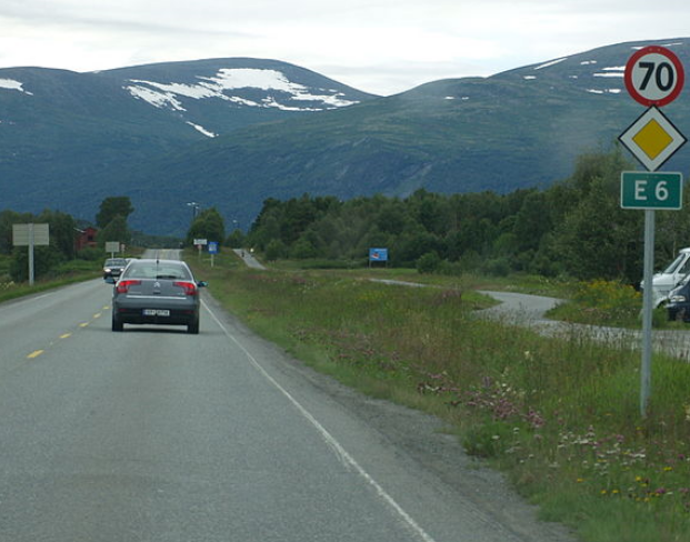 Utsnitt av E6 ved Oppdal